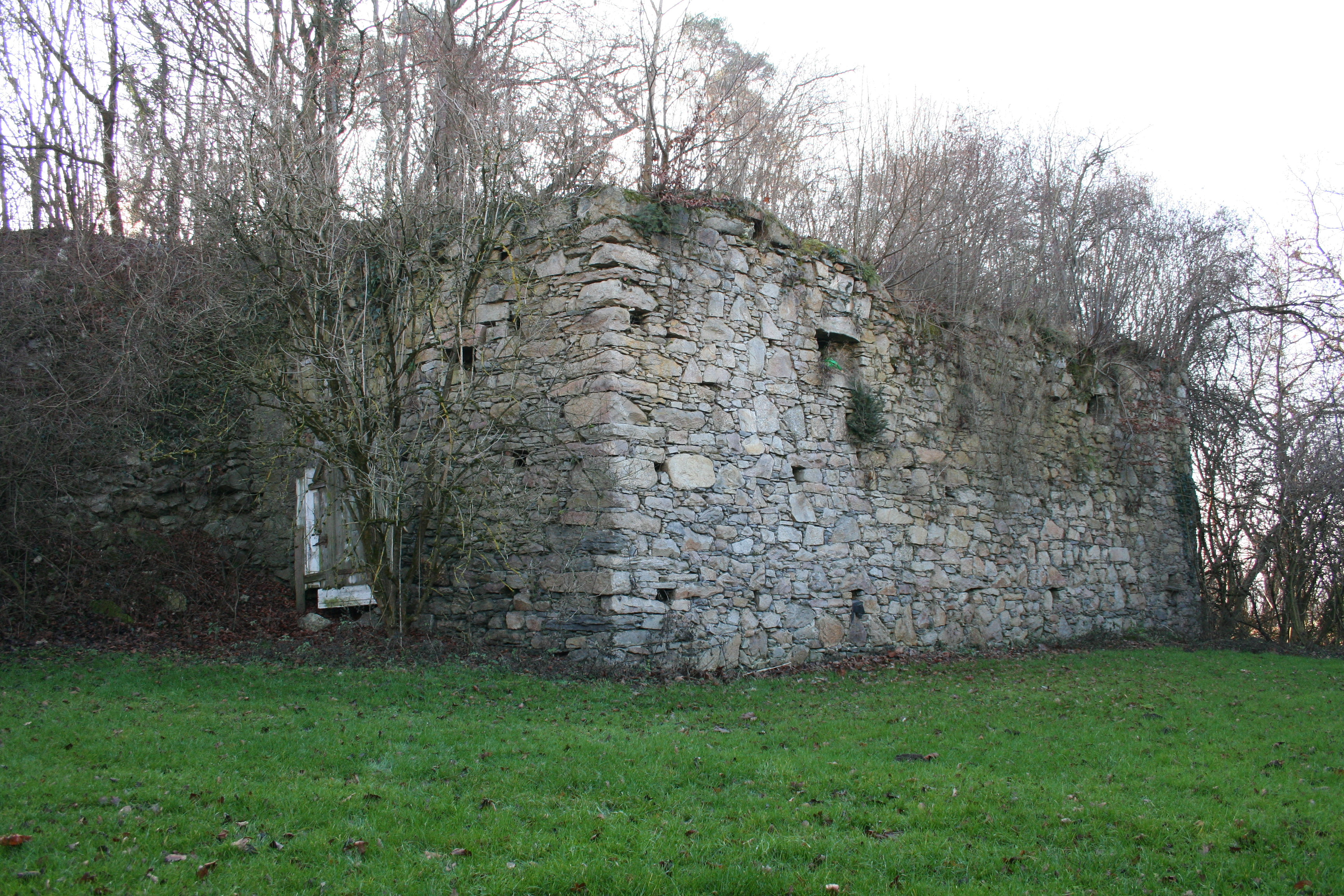 Burgruine Luftenberg, Hochburg